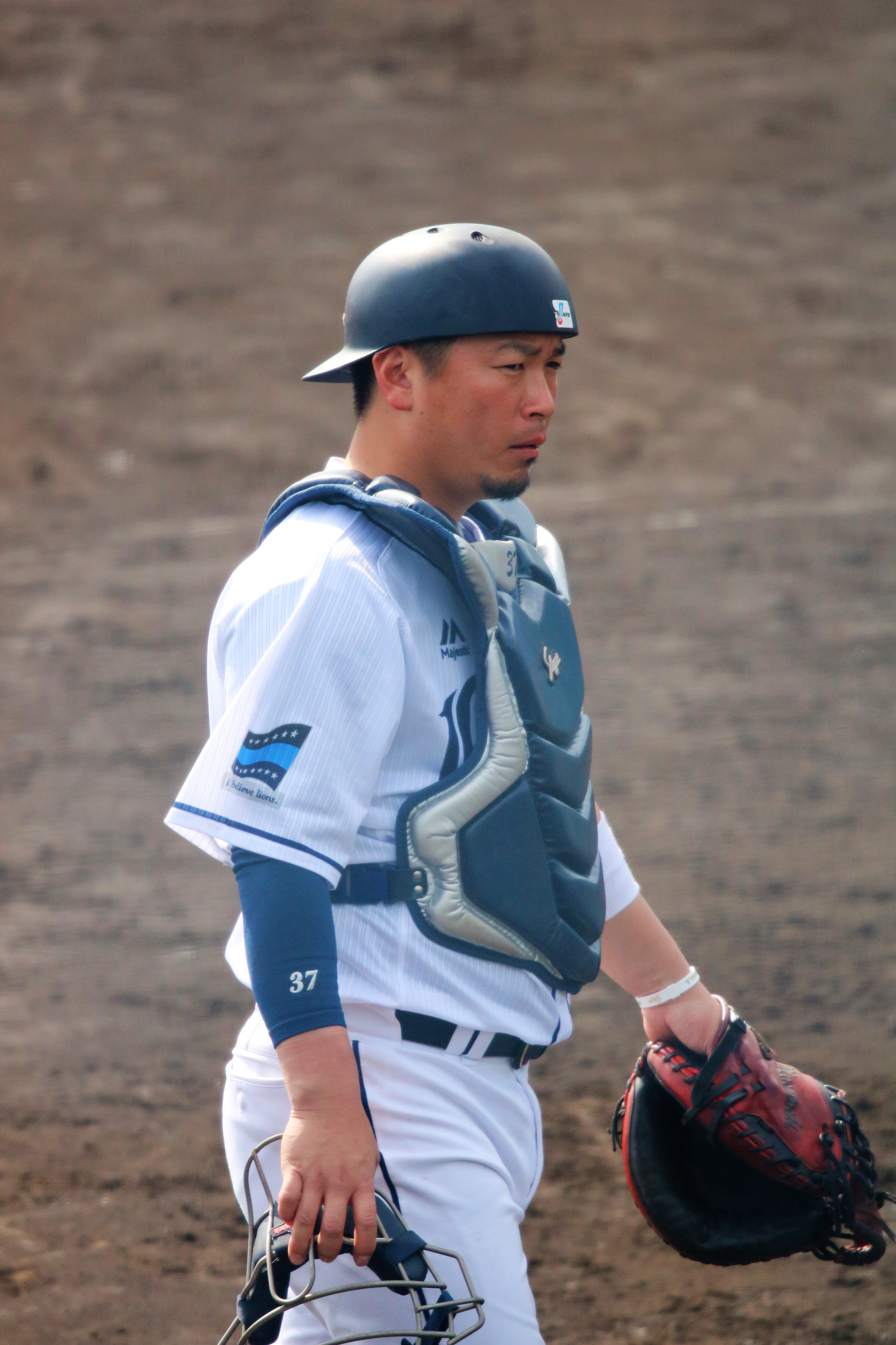 2018/2/9 宮崎・南郷キャンプ